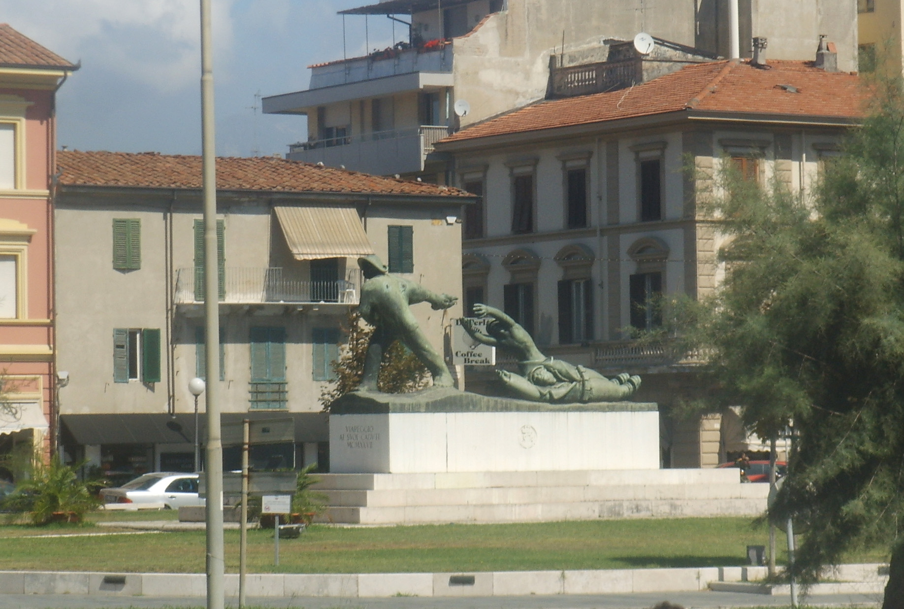 monumento ai caduti, plaza Garibaldi, Viareggio; 1927; Lorenzo Viani